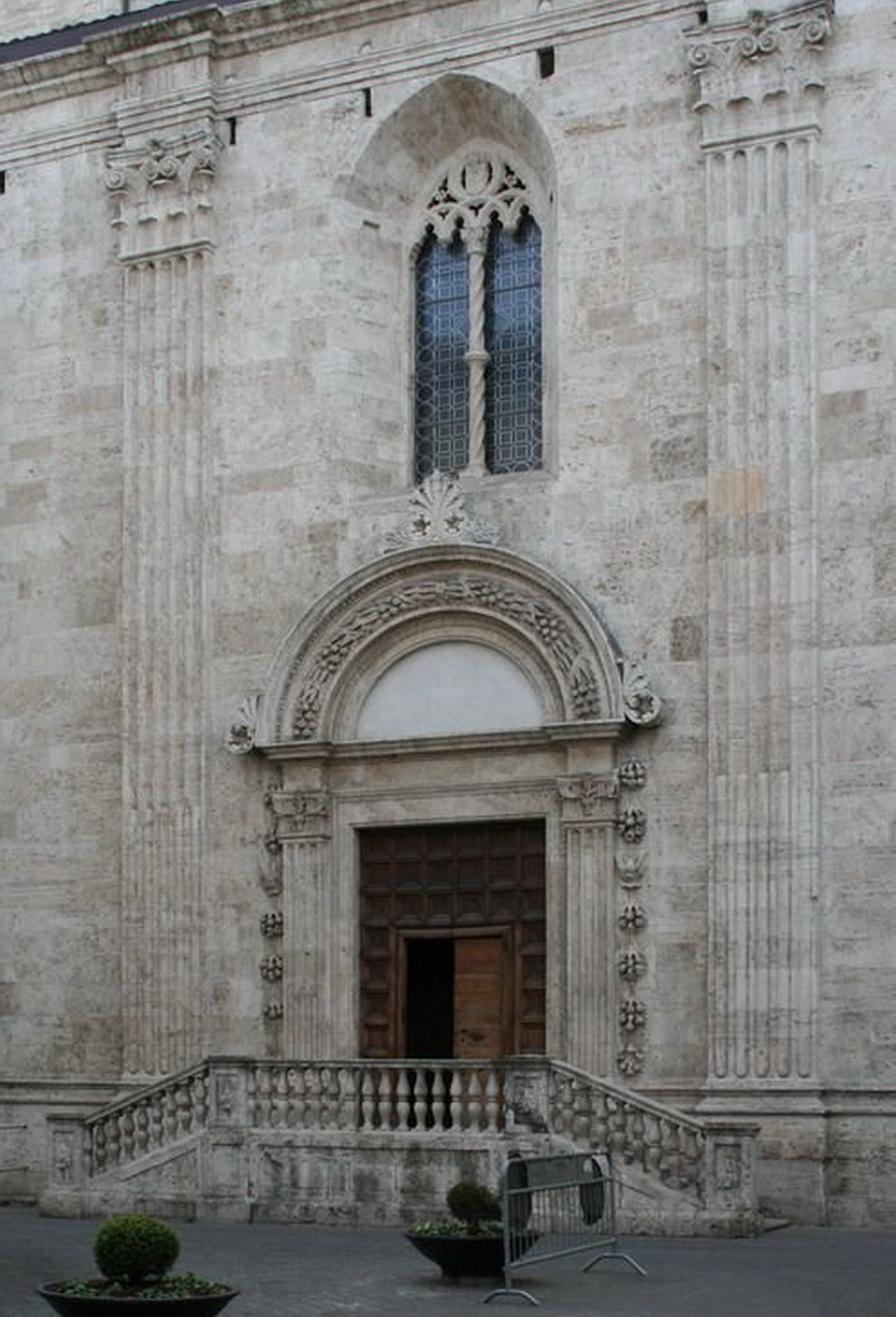 Porta della Musa, ingresso laterale Duomo di Ascoli Piceno , esterno giorno, proprio scatto Sibilla.io "Utilizzo concesso" Ticket#2007040410014627 (ticket per le immagini) This file is licensed under Creative Commons 3.0 license